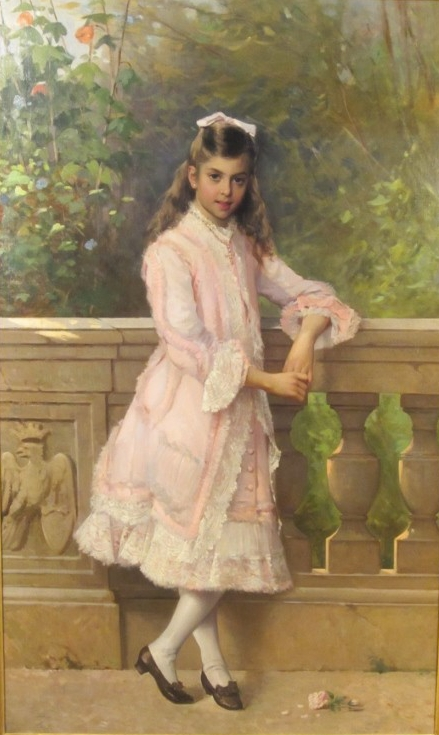 Anna Maria Borghese, née de Ferrari (1874-1824)